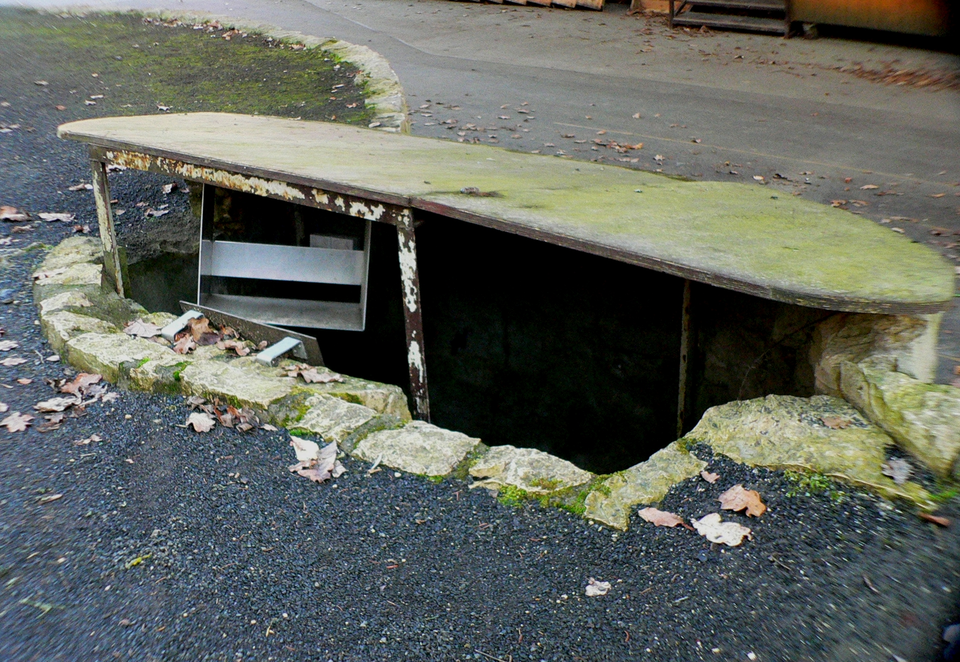 Waldbühne Heldritt in Bad Rodach-Heldritt, Souffleurkasten